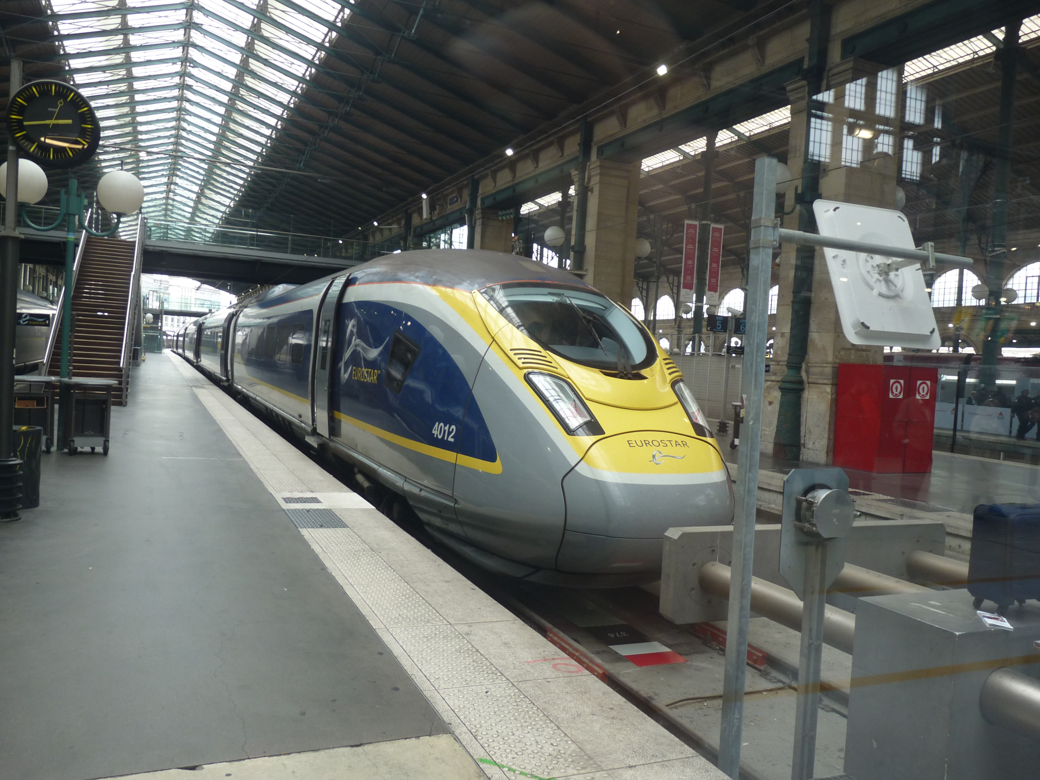 De nieuwe 320 versie van Eurostar in Paris Nord